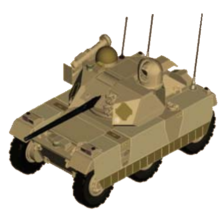 ARV-Assault, Deferred Concept